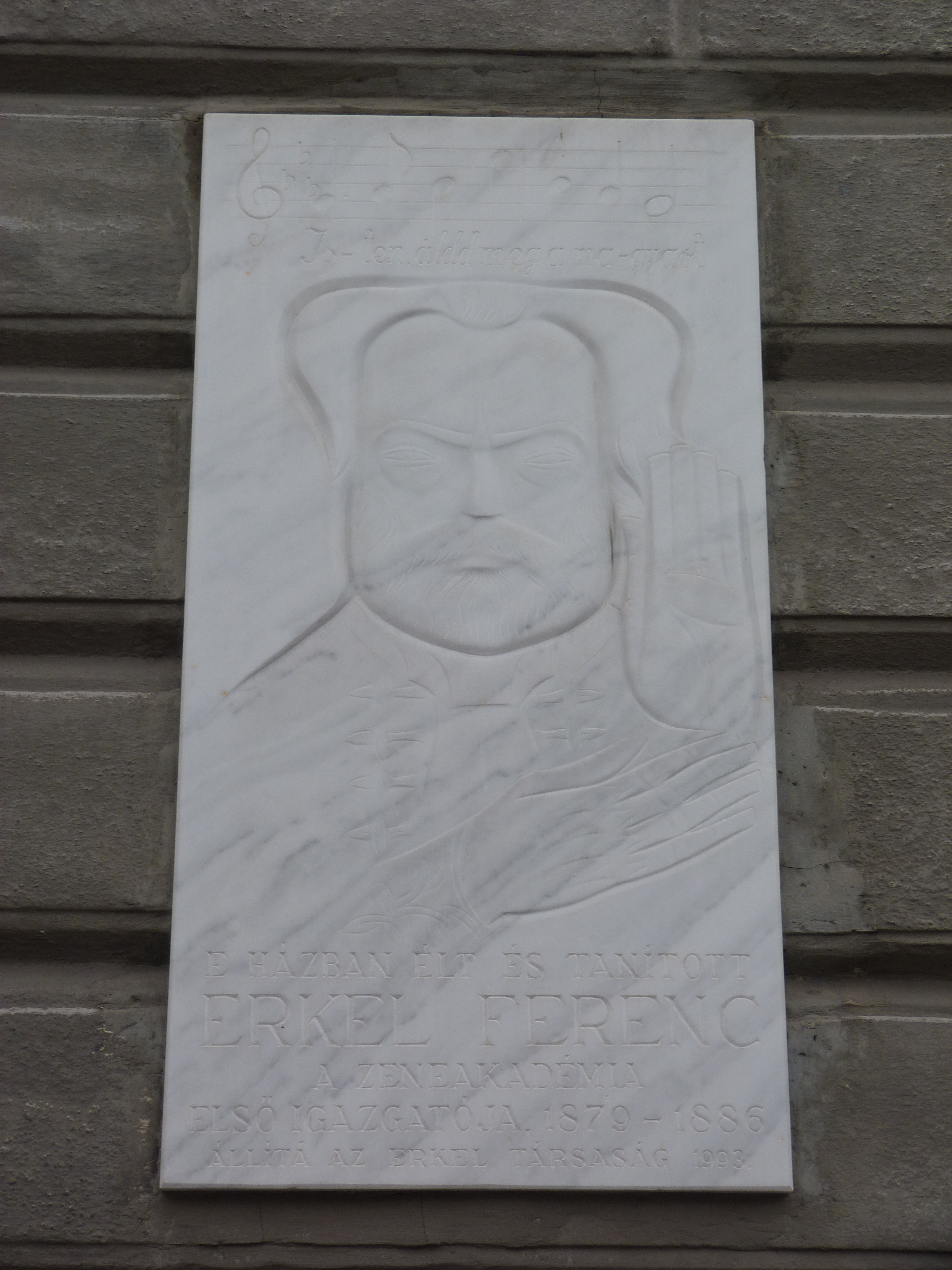 A felvétel 2013. január 14 -én készült Budapesten. A terézvárosi Andrássy út 67 szám falán Erkel Ferenc emléktáblája. ©© Published under Creative Commons in the Metapolisz DVD line. All of the photos and vids in the Metapolisz DVD line are under Creative Commons and can be used even for commercial – for profit – purposes. Recommended Citation Derzsi Elekes Andor: Metapolisz DVD line ©© Megjelent Creative Commons alatt a Metapolisz sorozatban. A Metapolisz sorozat valamennyi képe és filmje Creative Commons alatti valamint kereskedelmi - for profit - célra is felhasználható. Ajánlott hivatkozás: Derzsi Elekes Andor: Metapolisz DVD line